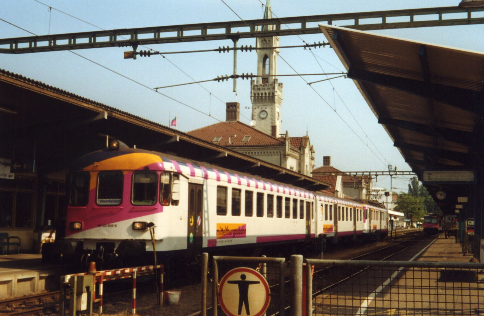 Personenzug der Mittelthurgaubahn im Konstanz Hauptbahnhof.